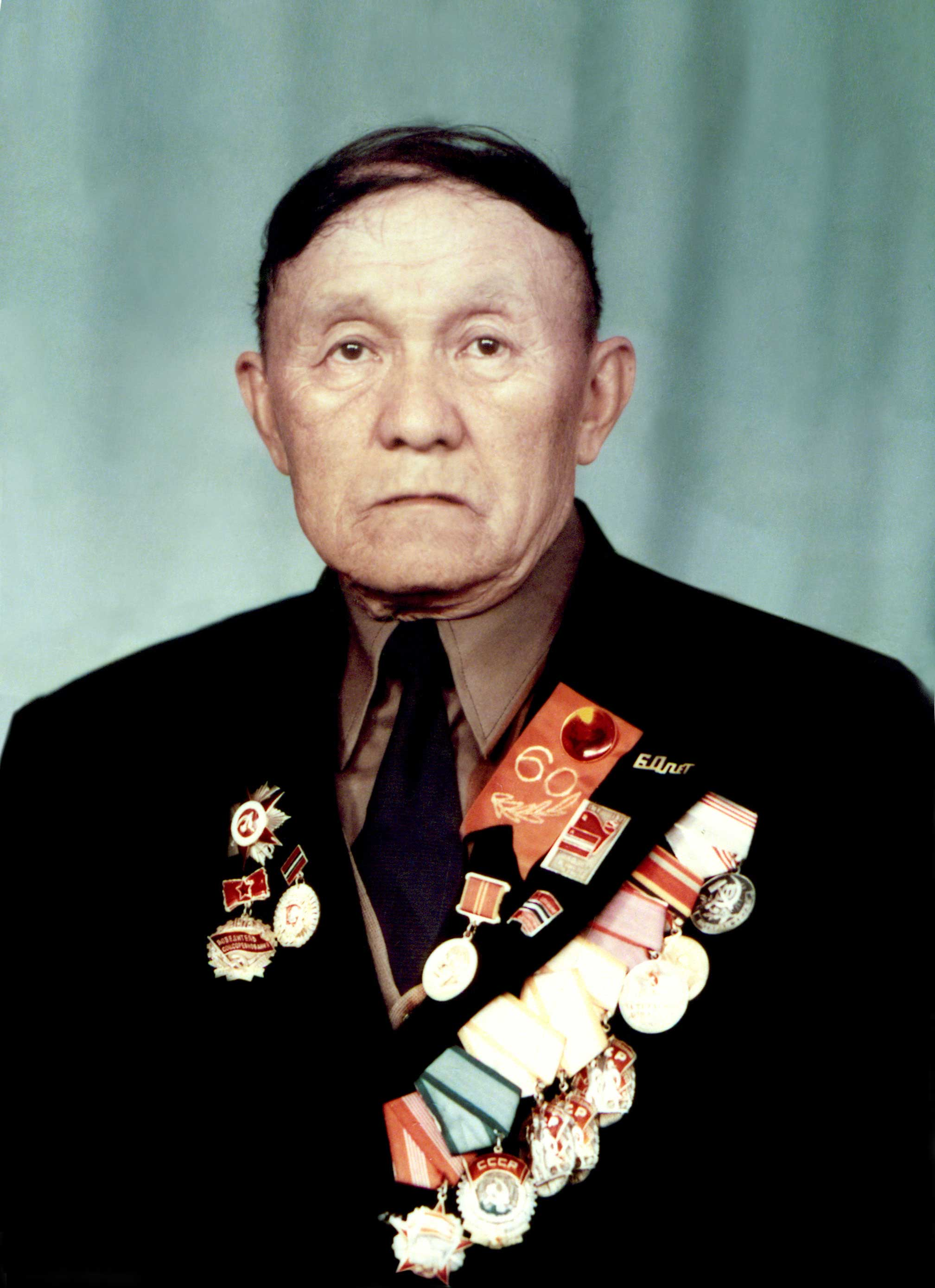 Мамат Нурбаев Государственный деятель Киргизской ССР